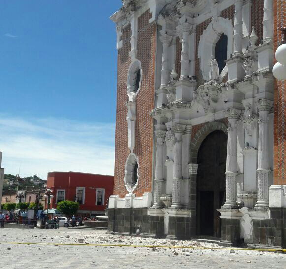 2017 earthquake in Tlaxcala City.jpg